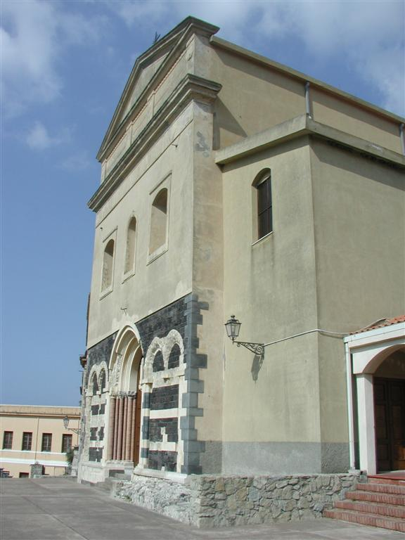 foto facciata Cattedrale S. Bartolomeo, Patti (ME)